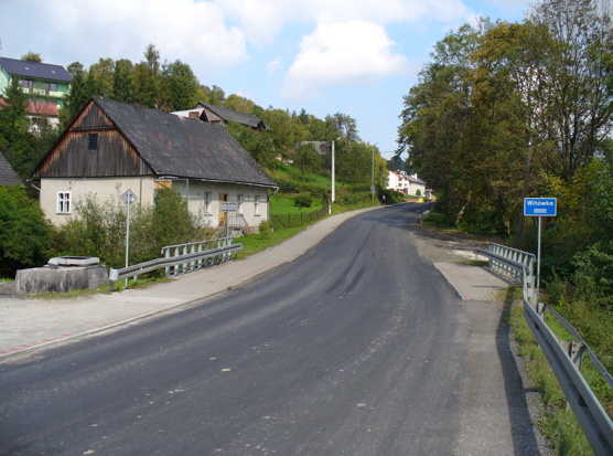 Baczyn (powiat suski), przejazd nad potokiem Witówka